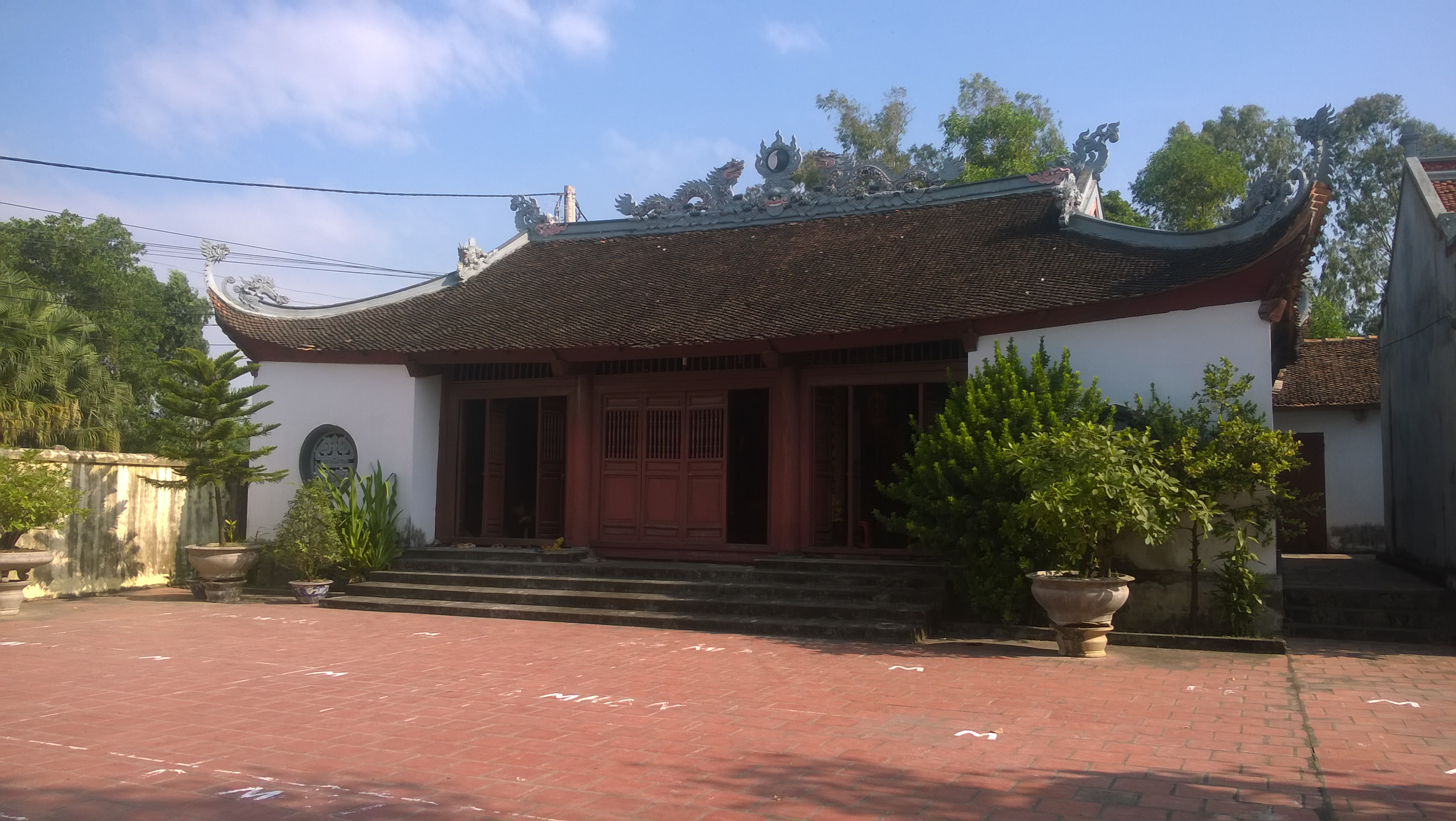 Đình làng Ném Đoài ở Khắc Niệm, Tp Bắc Ninh thờ tướng quân Nguyễn Thủ Tiệp thời loạn 12 sứ quân